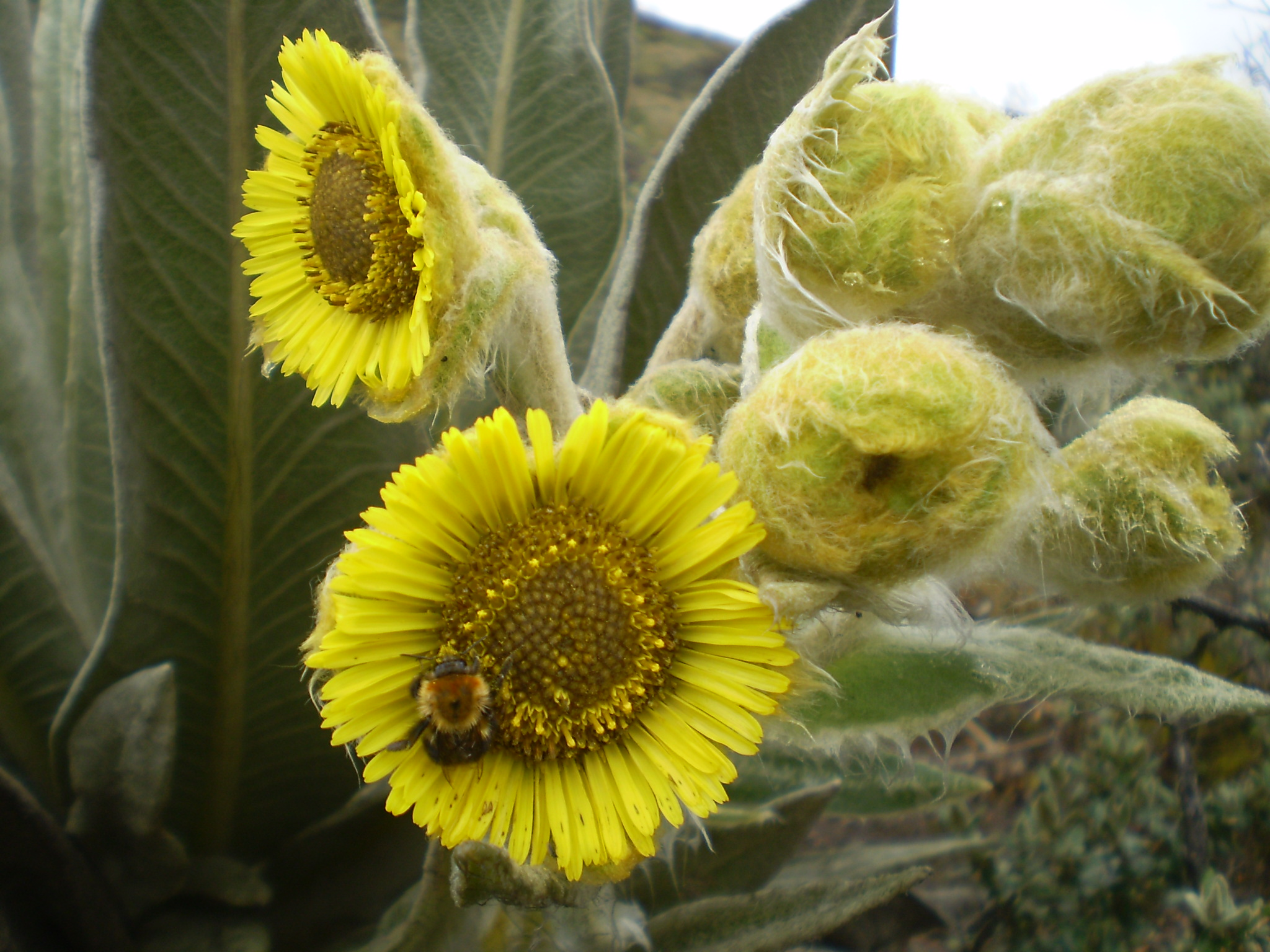 Geschlossene und offene Blüten einer Rosettenstaude (Páramo de Guerrero, Kolumbien)